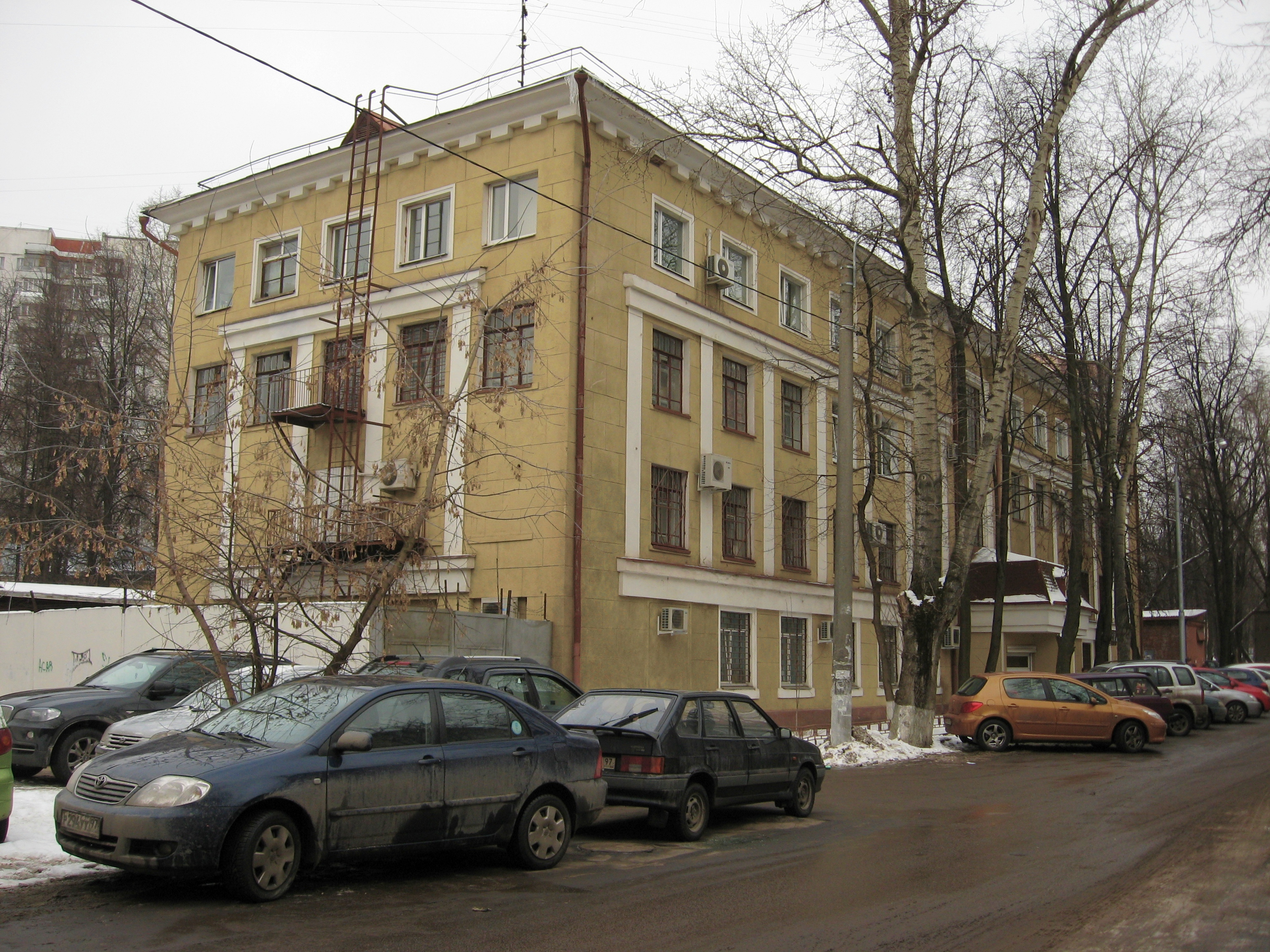 2-й переулок Петра Алексеева, дом 2, Москва